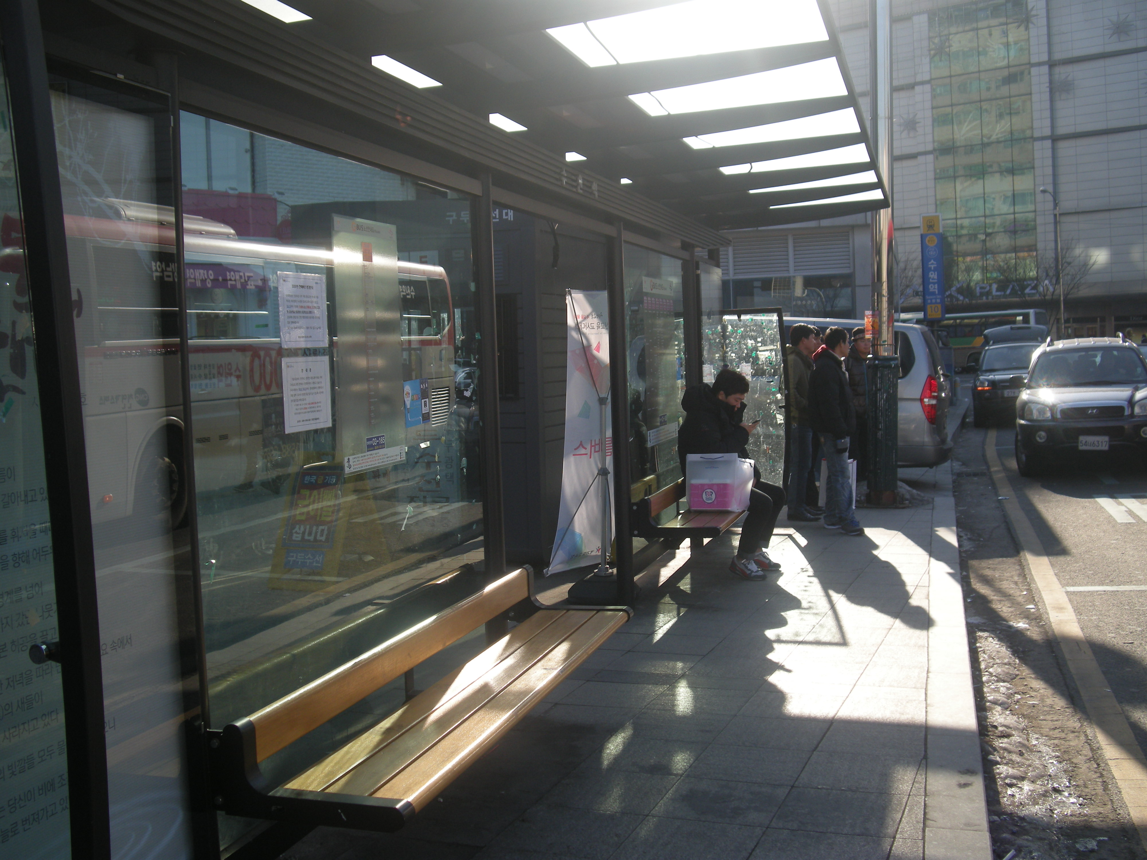 수원역시외버스정류장